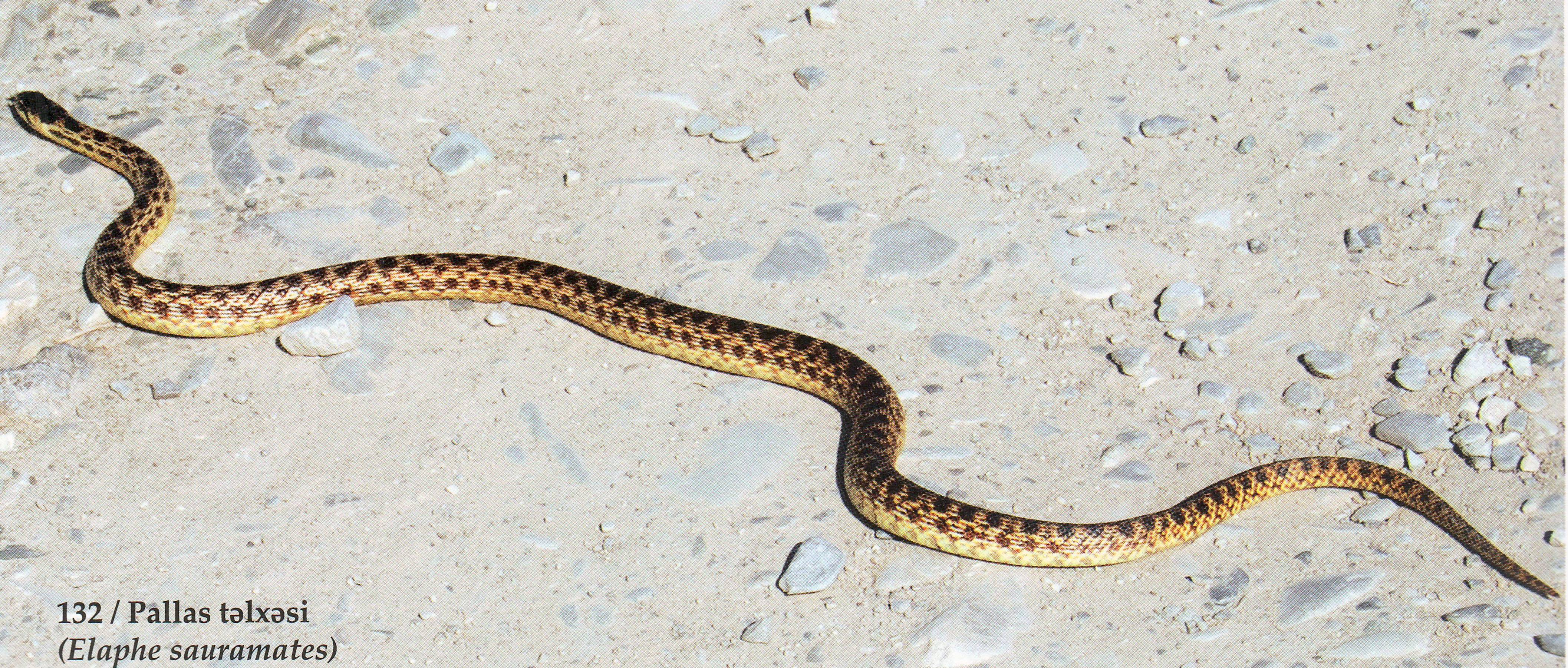 Salyan Pallas təlxəssi